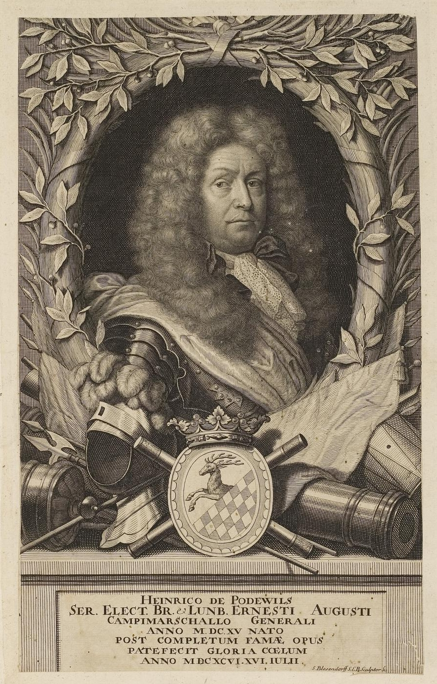 Grafik aus dem Klebeband Nr. 1 der Fürstlich Waldeckschen Hofbibliothek Arolsen Motiv: Heinrich von Podewils, braunschweigisch-lüneburgischer Generalfeldzeugmeister